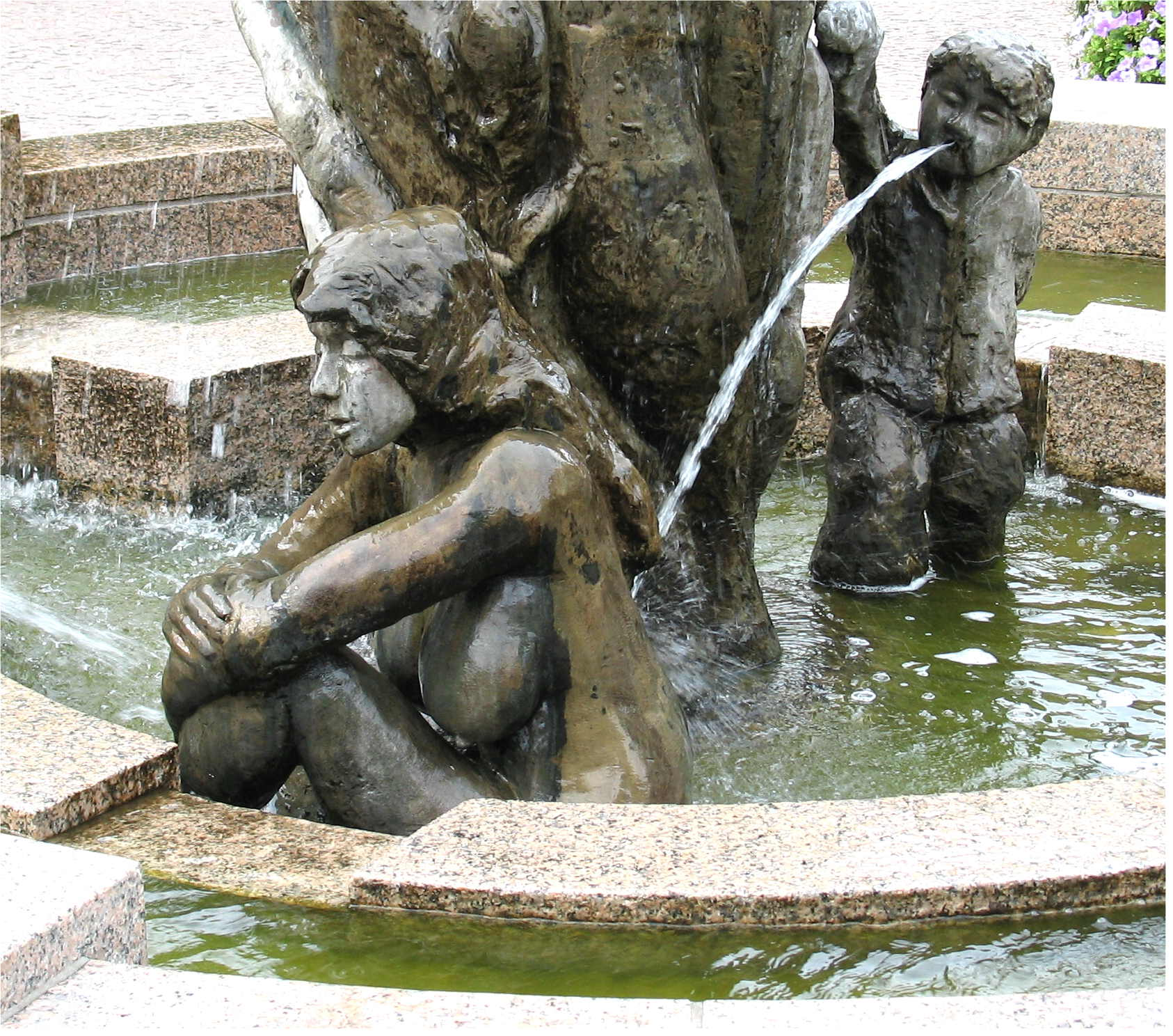 Bur zu Bad Sobernheim. Bur